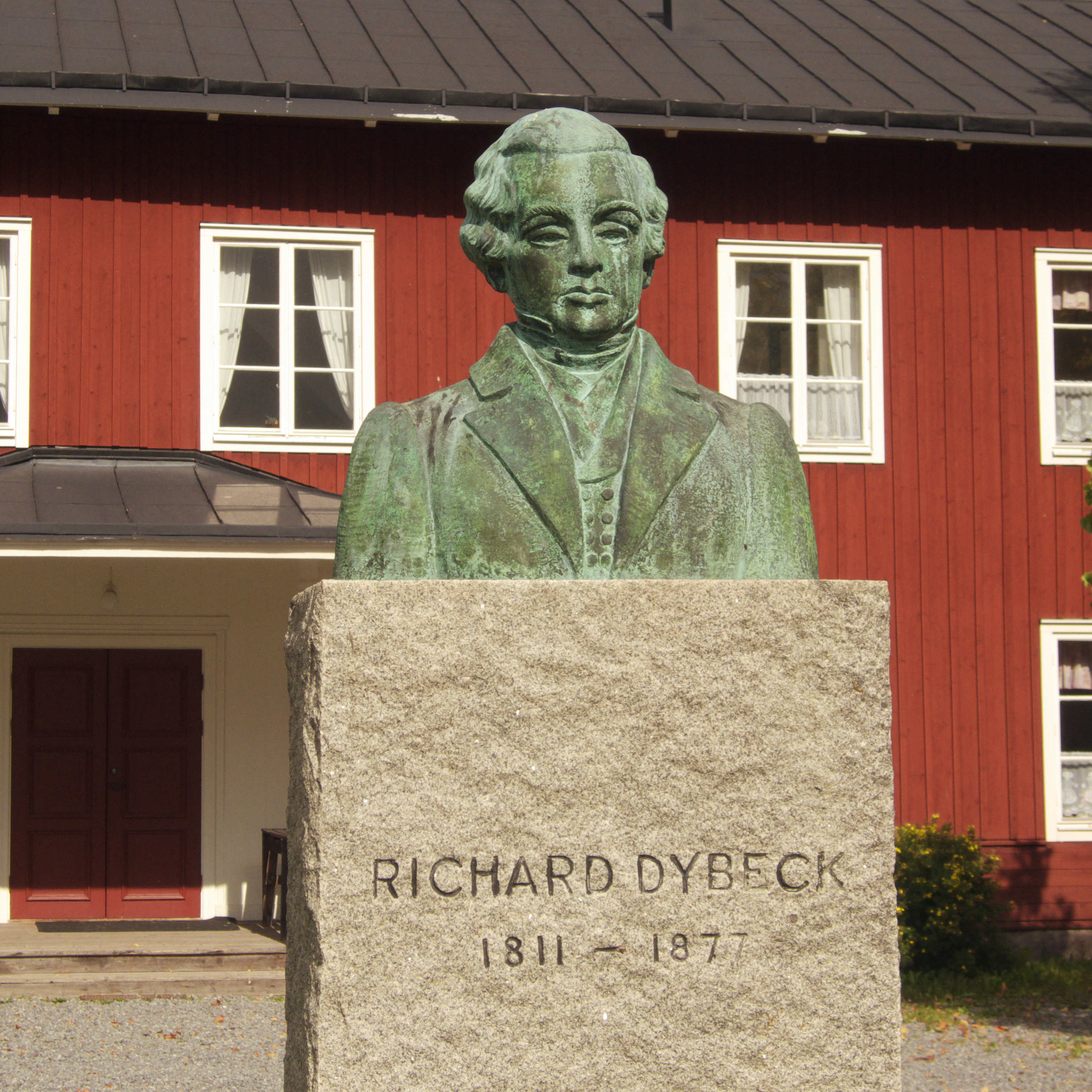 Richard Dybecks byst vid Dybecksgården i Odensvi. Skulpturen utförd av skulptören Signe Ehrenborg-Lorichs (1889-1979).